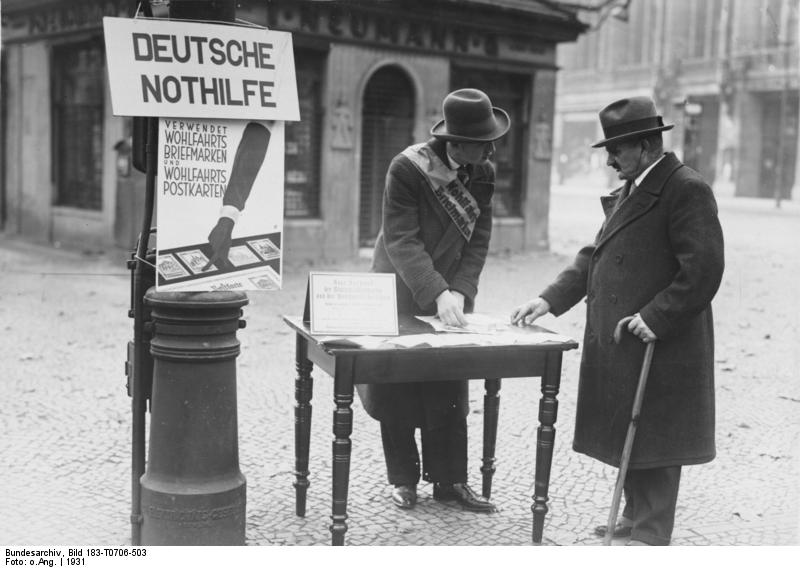 Verkauf von Wohlfahrtsmarken auf der Straße ADN-ZB/ Scherl Deutschland im Zeichen der Wirtschaftskrise 1929-1933 Verkauf von Wohlfahrtsbriefmarken und -postkarten auf der Strasse durch die Deutsche Nothilfe. (Aufnahme: 1931) 37347-31